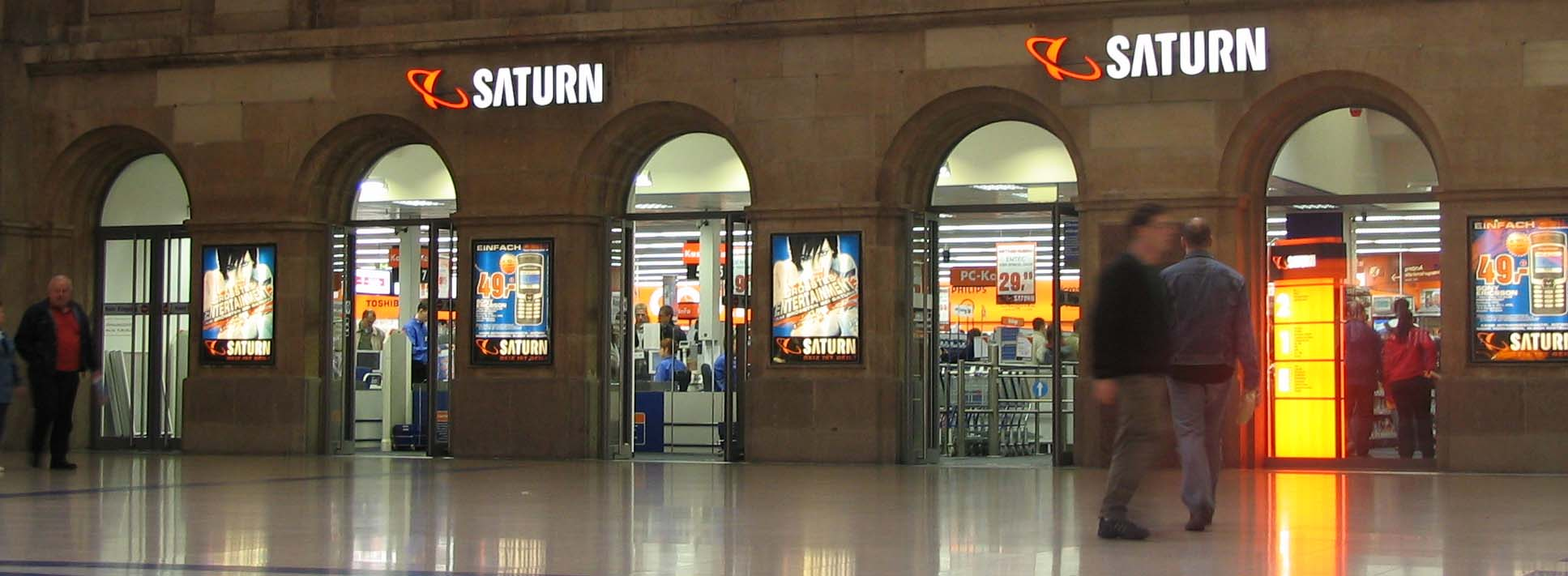 Eine Filiale von Saturn im Leipziger Hauptbahnhof.